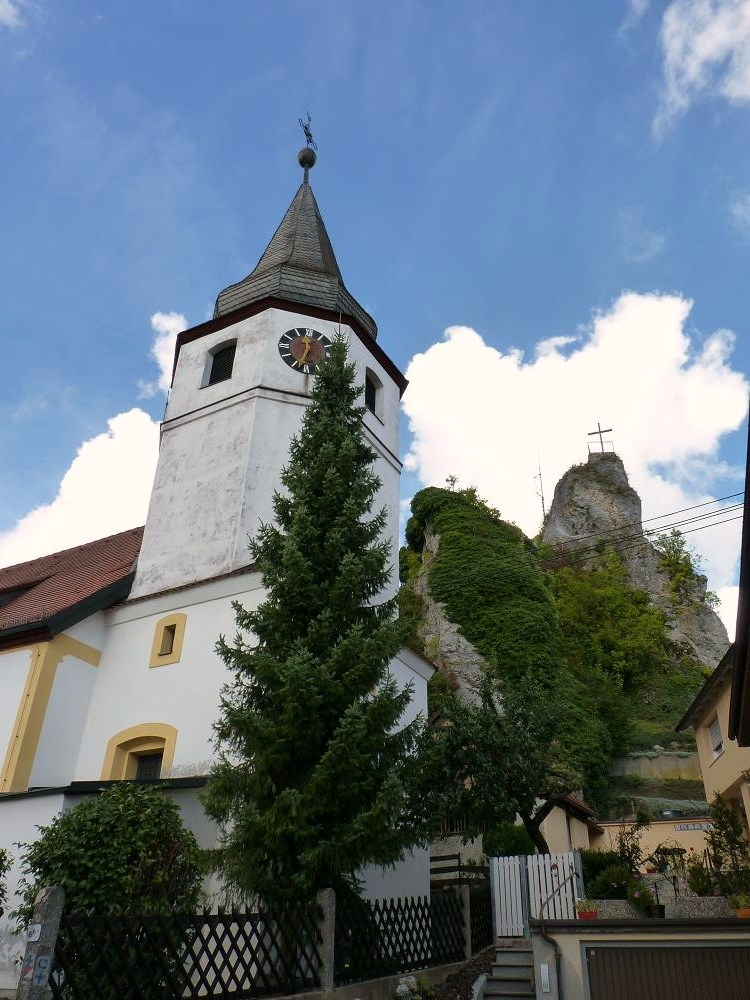 Kirche St. Erhard und Gipfel Wichsenstein